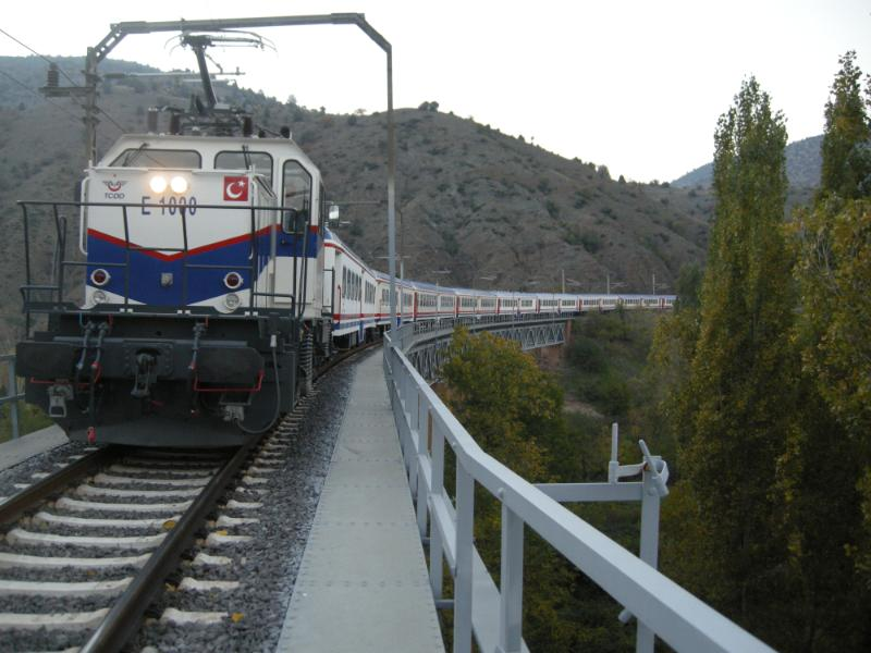 E1000 lokomotif Bilecik rampasında 500 ton çekerken